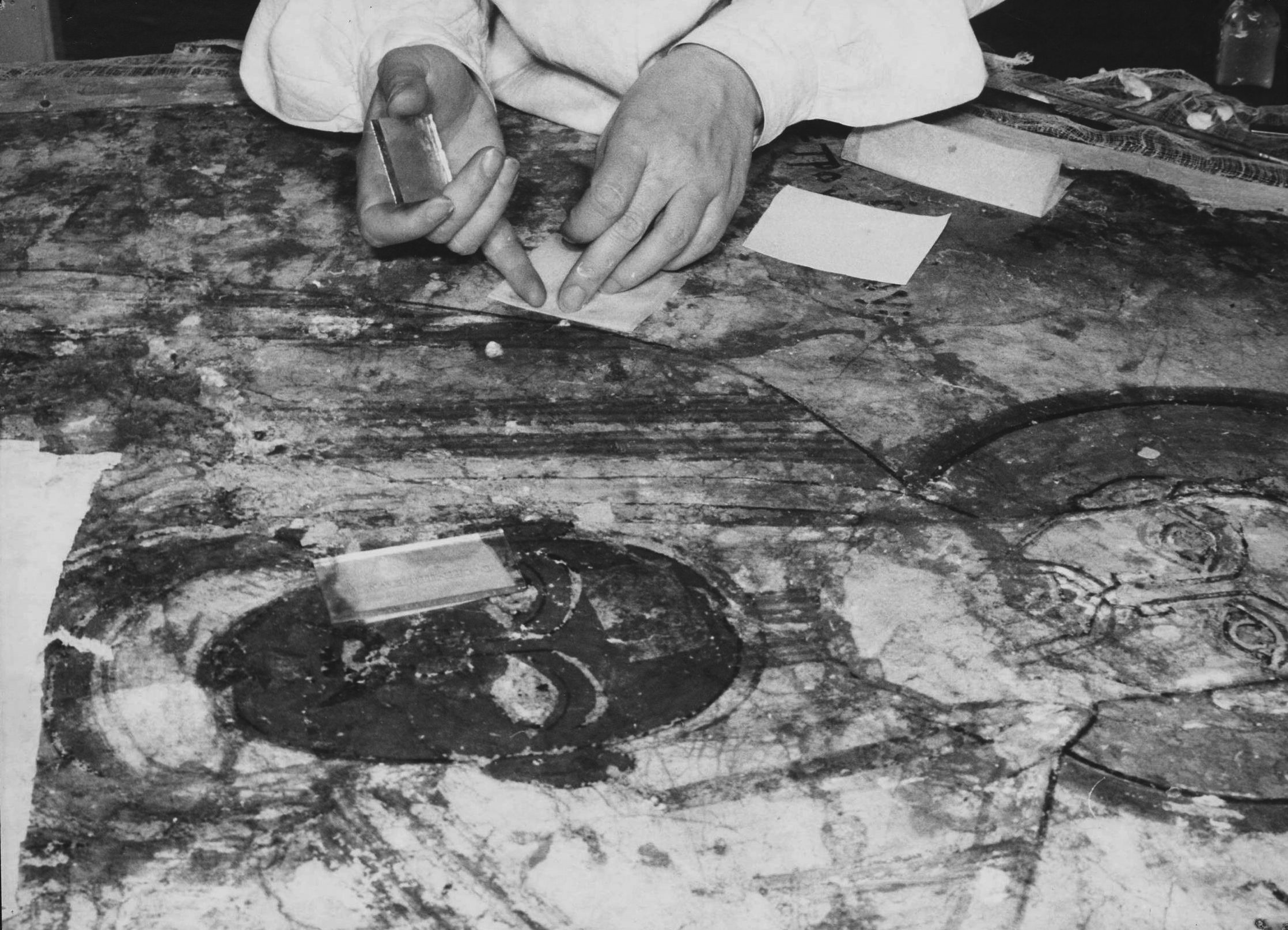 Prace konserwatorskie przy malowidłach z Faras w Muzeum Narodowym w Warszawie. Odwoskowywanie powierzchni malowidła przedstawiającego biskupa Petrosa ze świętym Piotrem Apostołem, nakładanie kompresów.